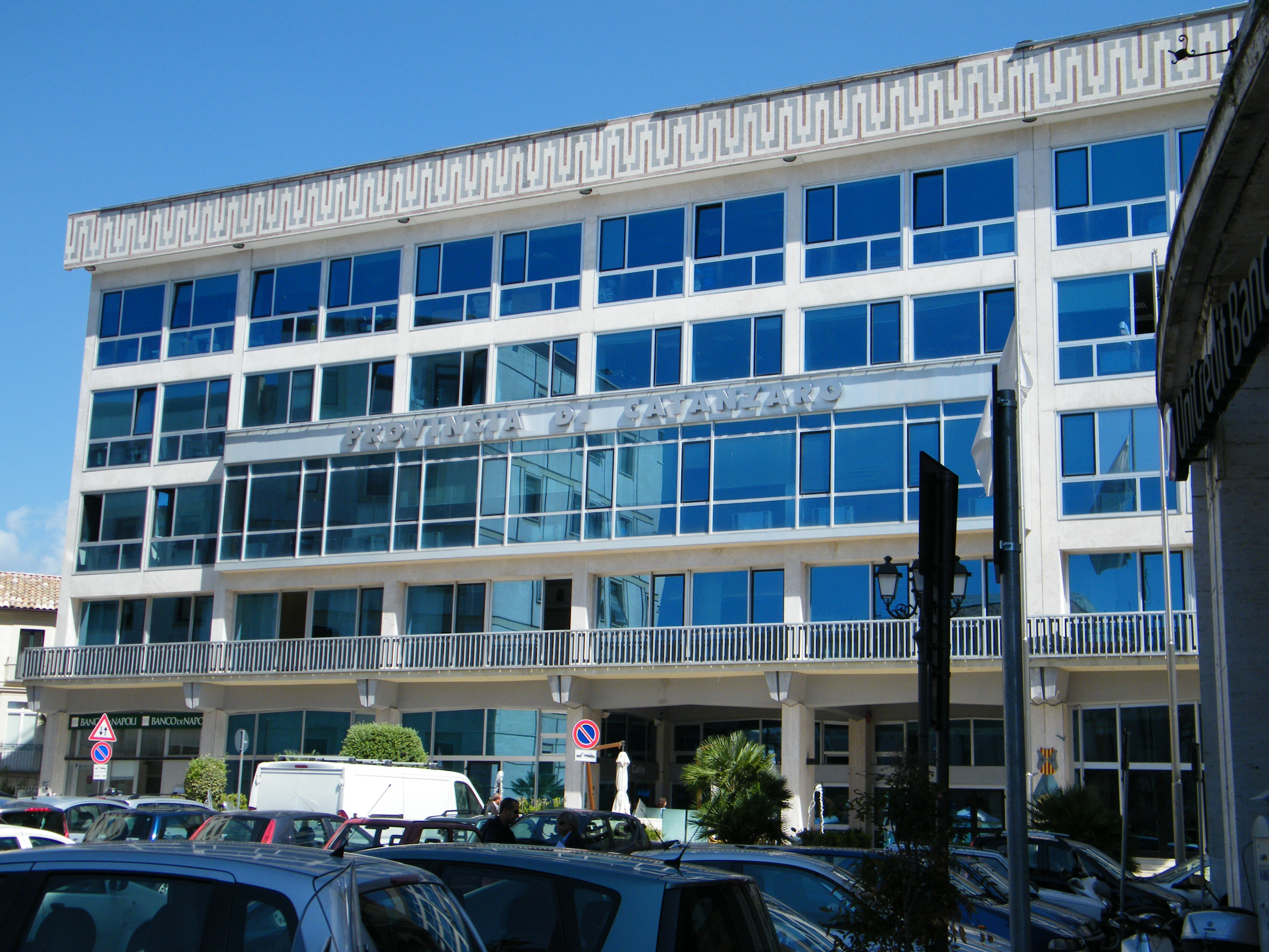 Palazza di vetro, sede dell'amministrazione provinciale catanzarese.